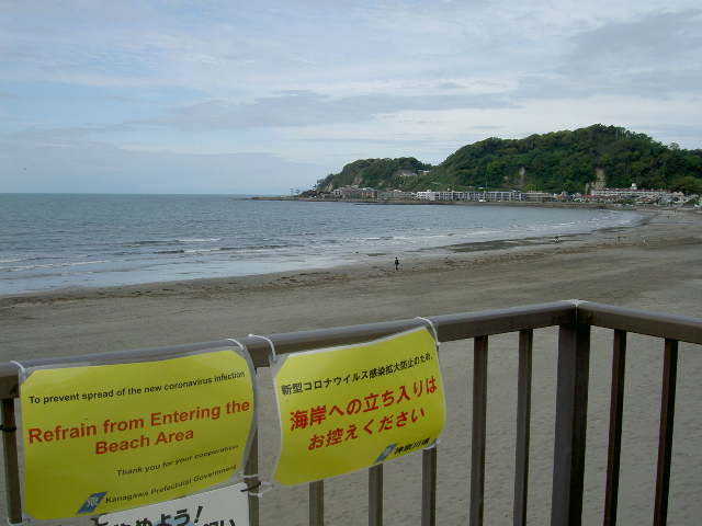 新型コロナウイルスで閉鎖中の由比ガ浜海岸（稲村ケ崎を望む）